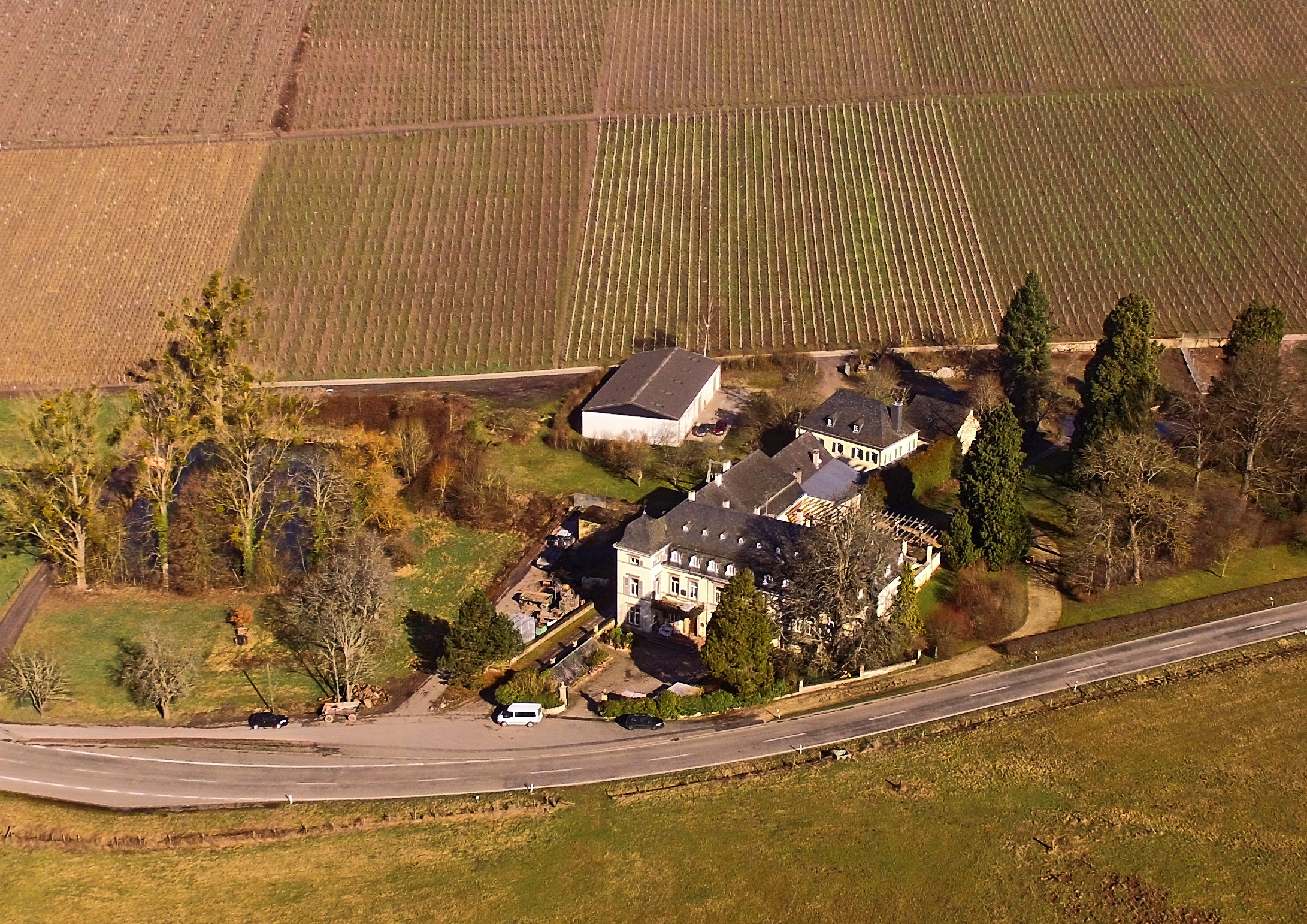 Die Gebäude es neuen Scharzhofs (großes Gebäude vorne) heute im Besitz des Weinguts Egon Müller und des alten Scharzhofes (kleines Gebäude hinten), heute im Besitz der Bischöflichen Weingüter Trier vor dem Wiltinger Scharzhofberg.